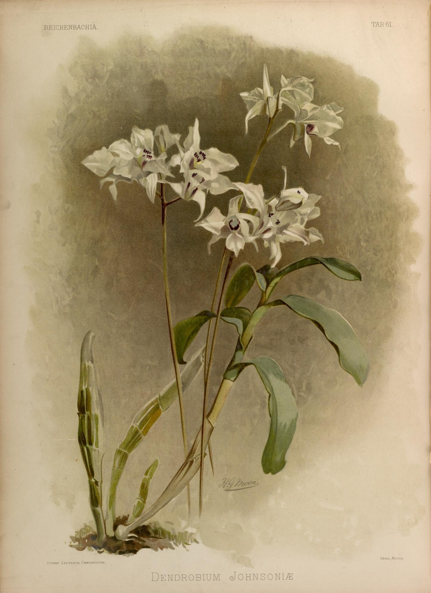 REICHENBACHIA. TAB 61. Dendrobium Johnsons